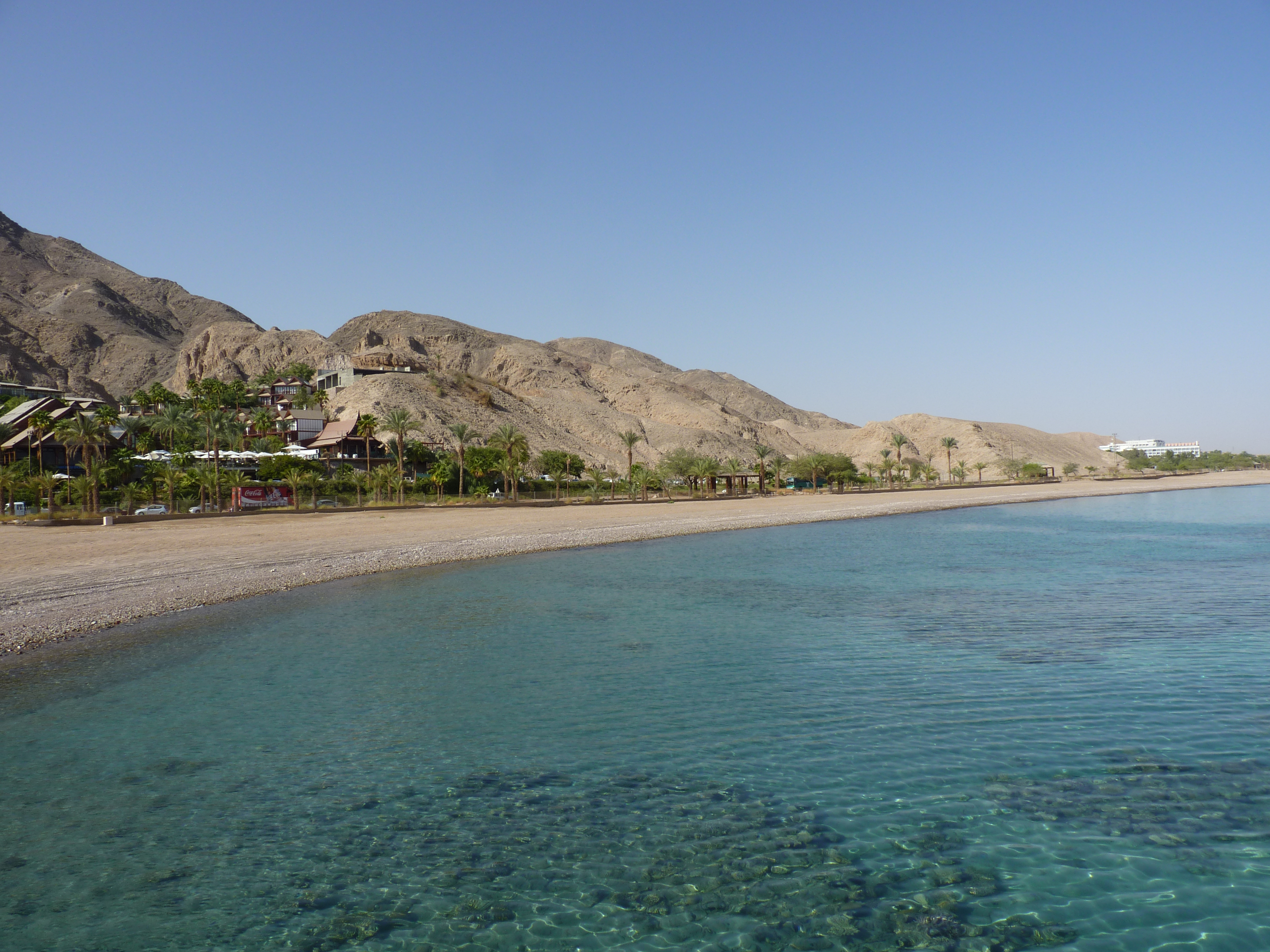 P1080791 Eilat